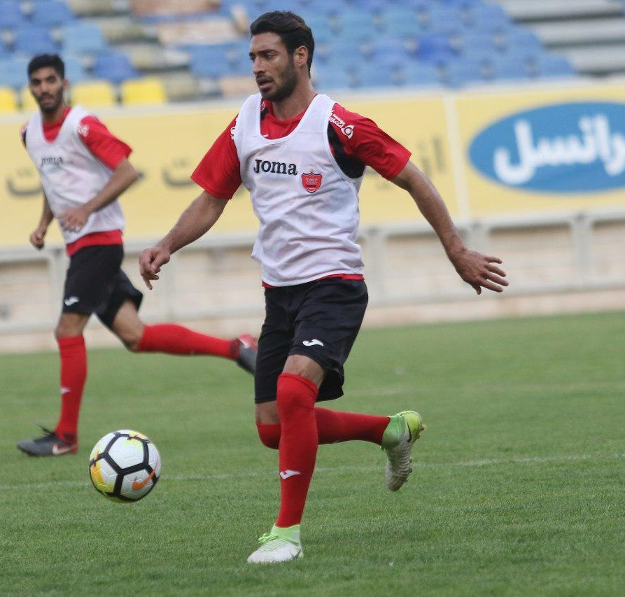 شجاع خلیل‌زاده در تمرینات تیم فوتبال پرسپولیس